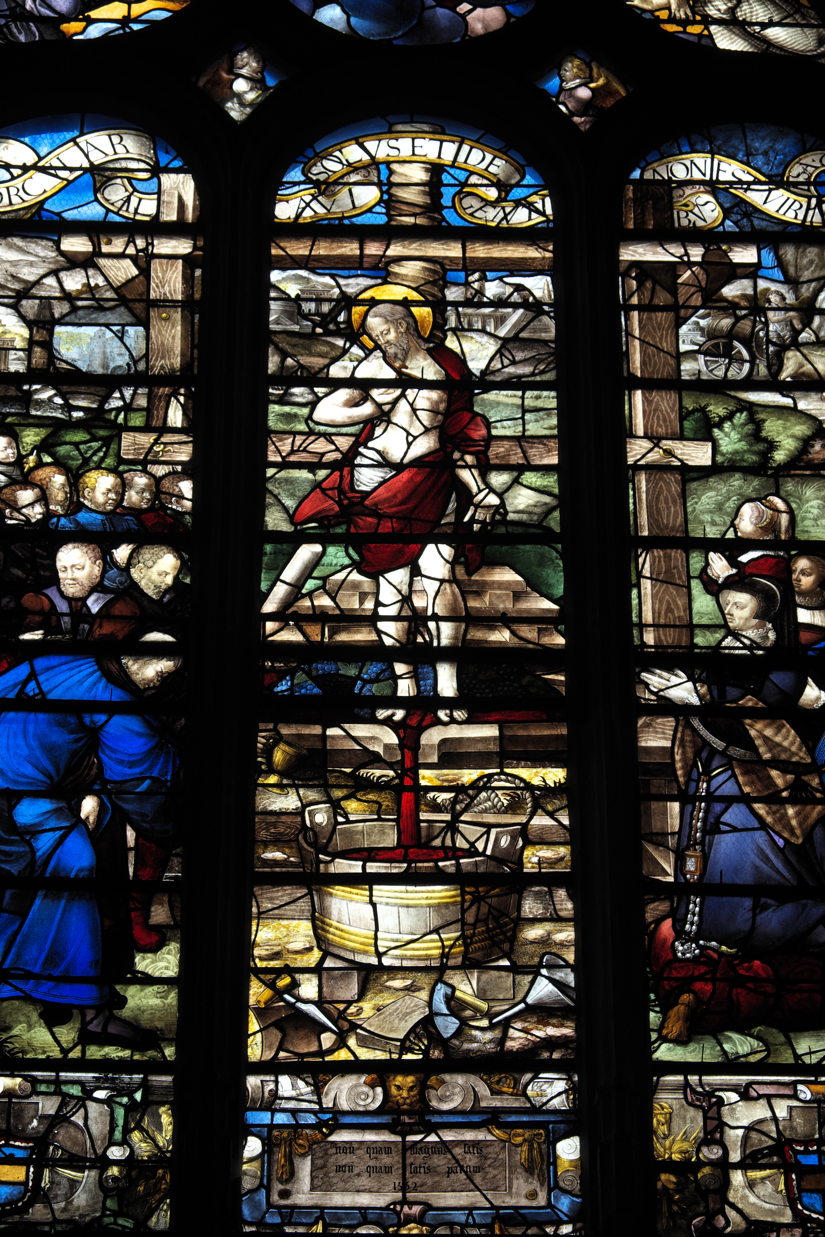 Katholische Kirche Sainte-Foy in Conches-en-Ouche im Département Eure (Haute-Normandie/Frankreich), Bleiglasfenster aus dem 16. Jahrhundert; Darstellung: Christus in der Kelter (Ausschnitt)